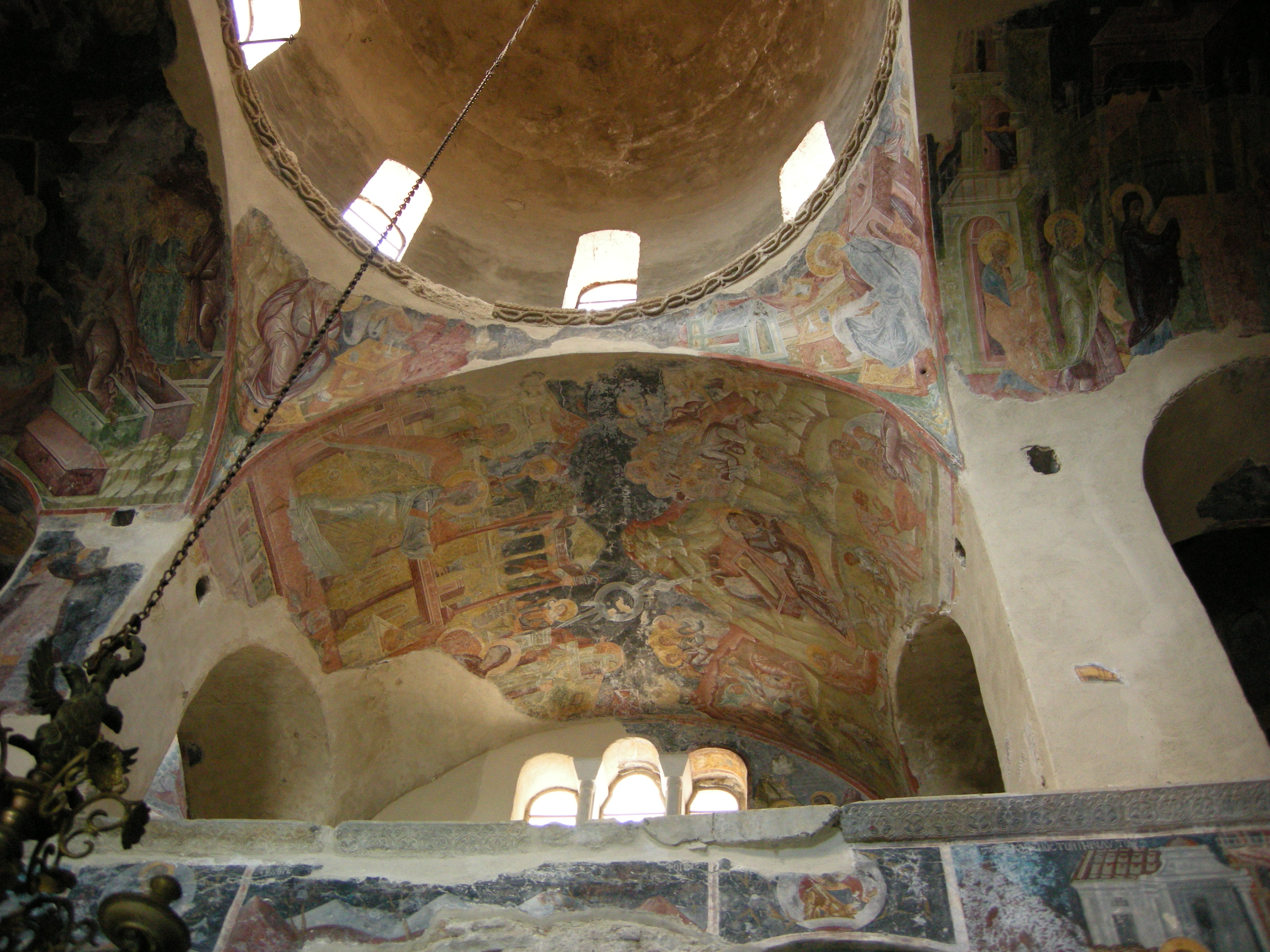 Pantanassa, interno